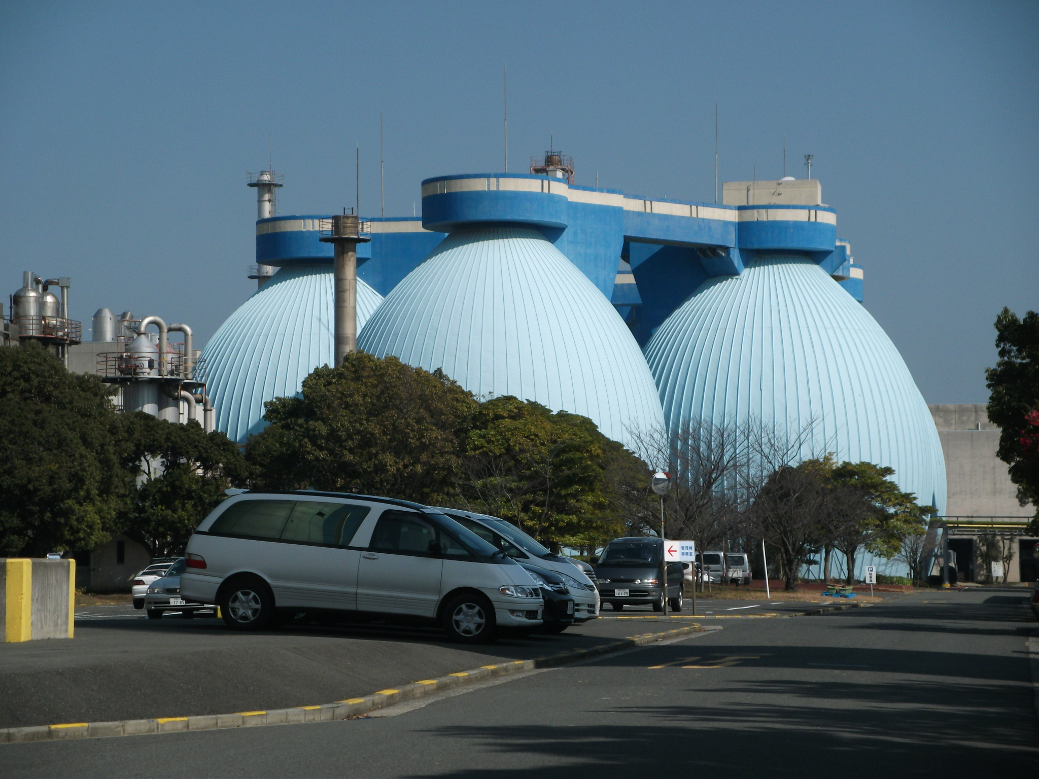 横浜市金沢区、南部汚泥資源化センターの消化ガスタンク